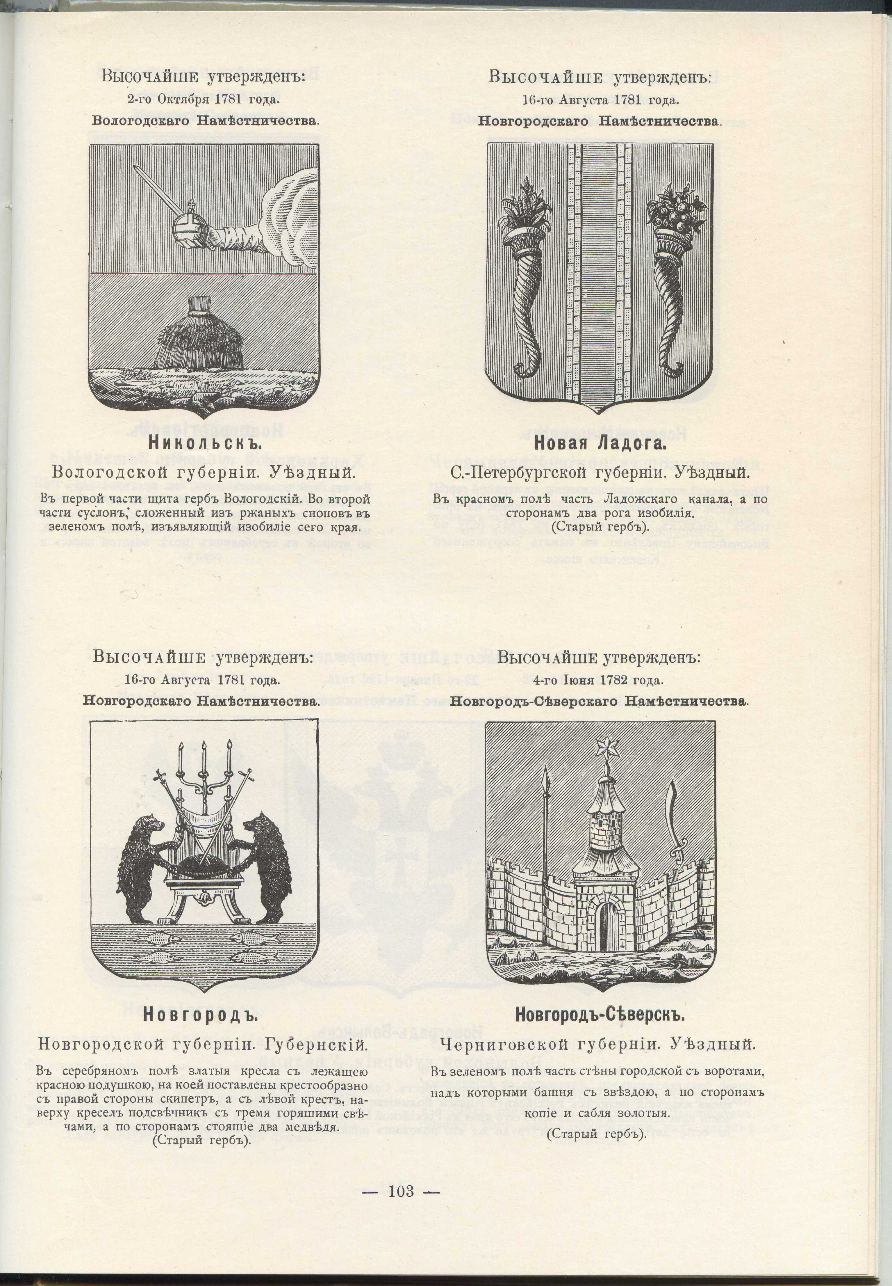 Official Russian Empire coats of arms. Гербы городов Российской Империи Никольск, Новая Ладога, Великий Новгород, Новгород-Северск(-ий) с официальными описаниями в Гербовнике Винклера.